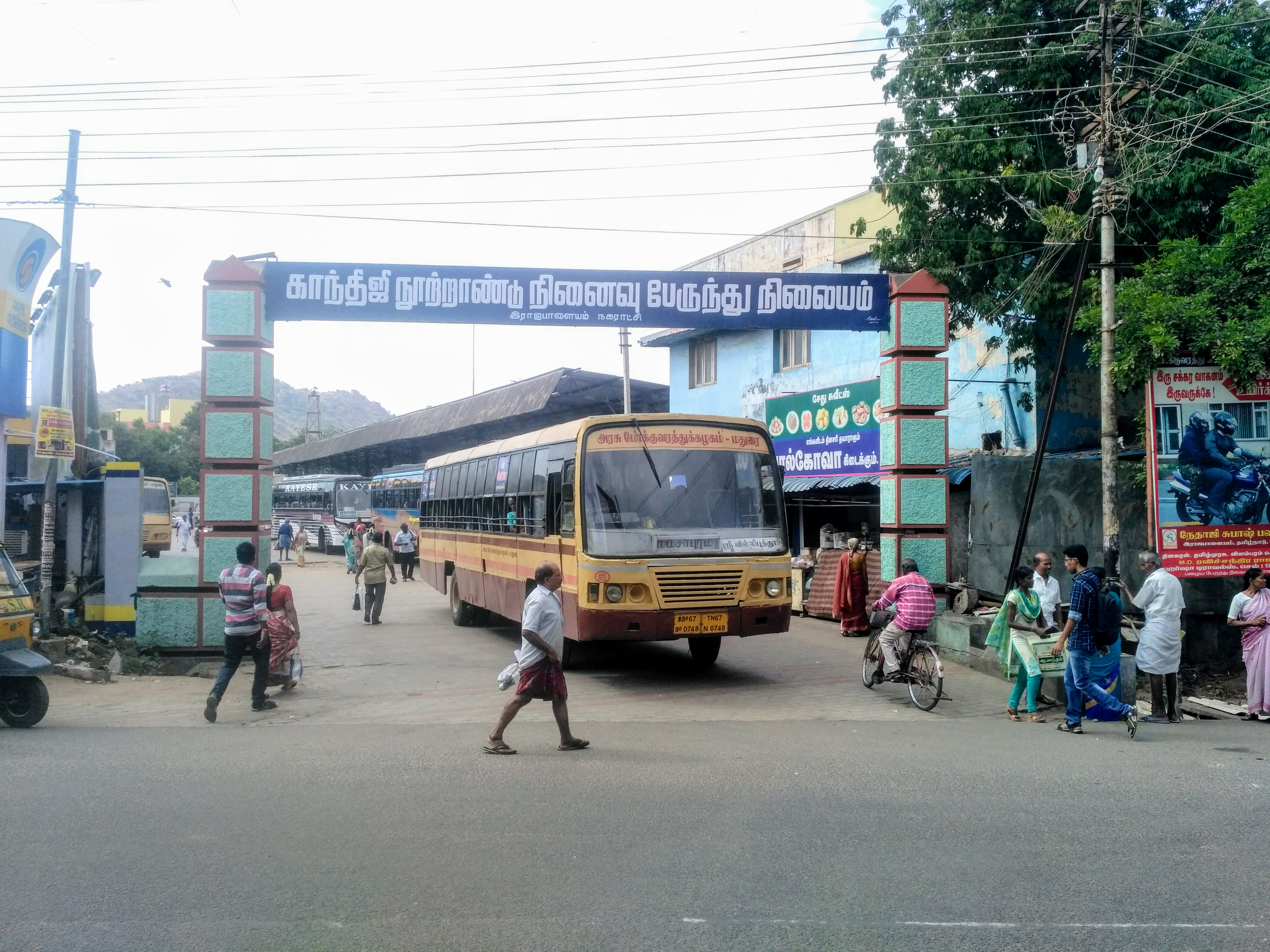 இராஜபாளையம் பழைய பேருந்து நிலையம் ...